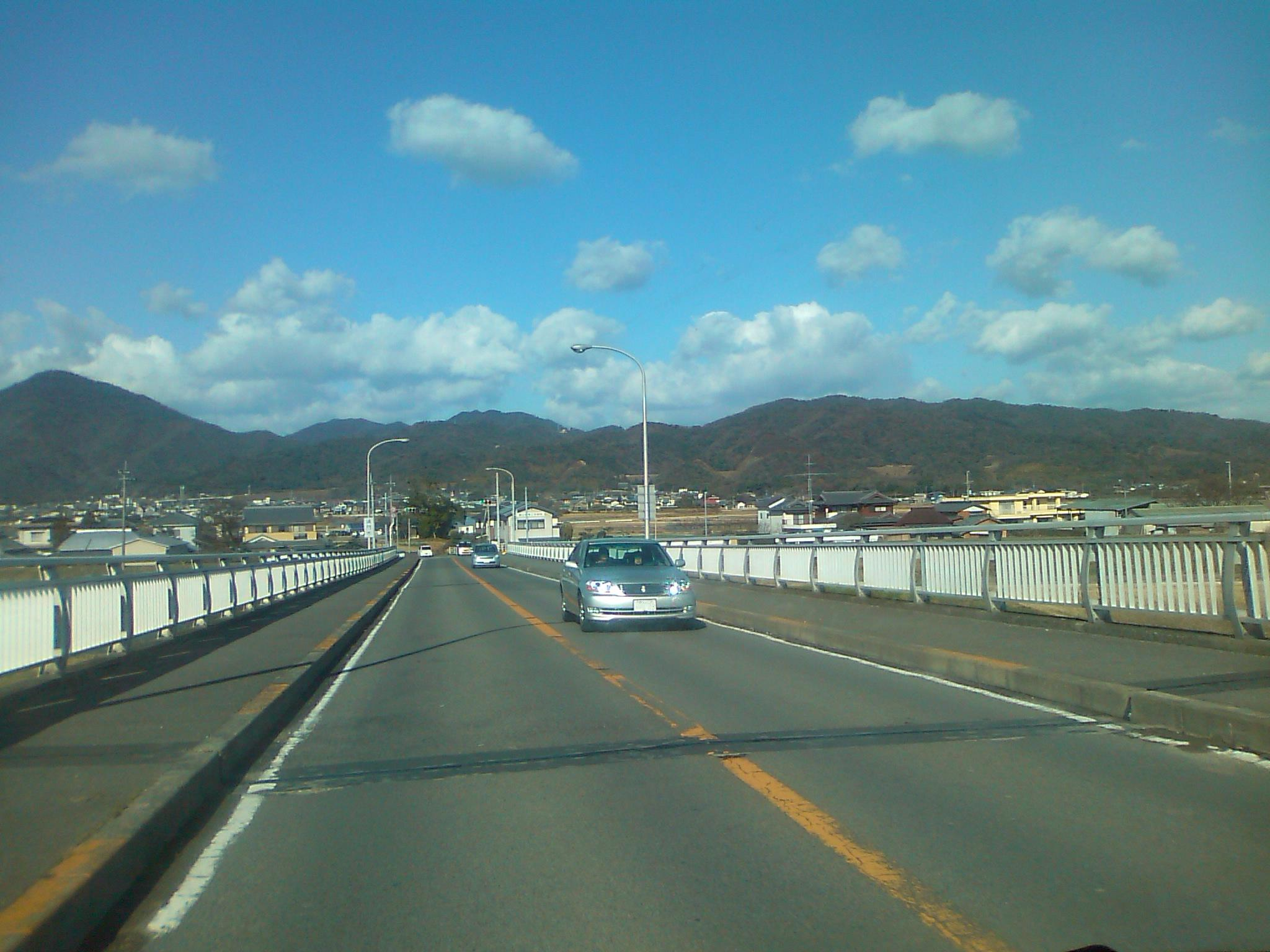 阿波中央橋から北方向